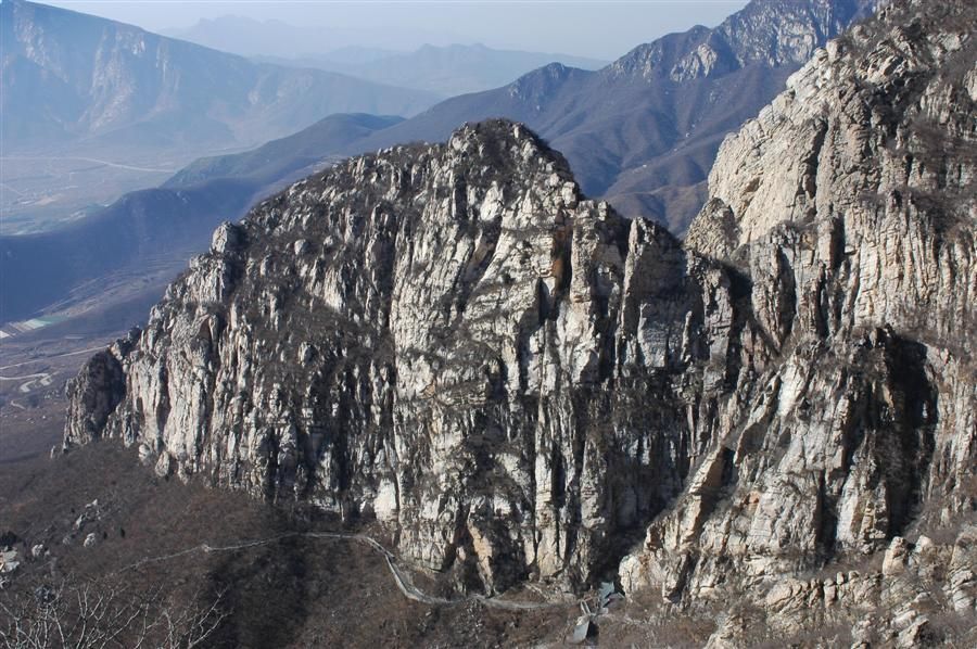 河南嵩山